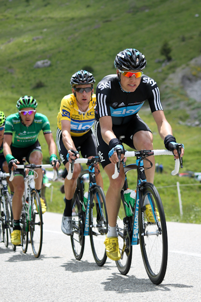 Braddley Wiggins emmené par Edvald Boasson Hagen